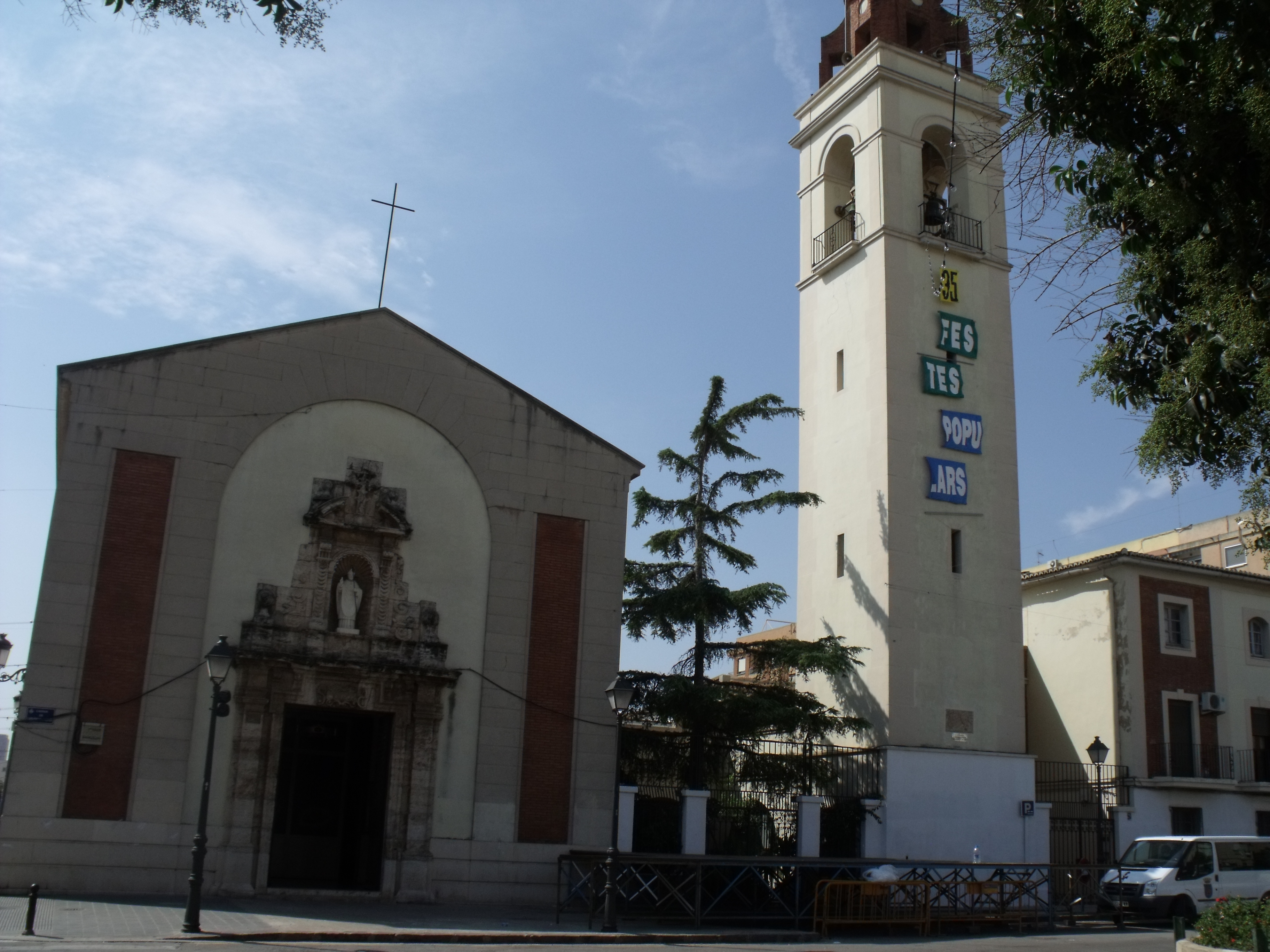 Iglesia parroquial de San Marcelino Obispo, Valencia.